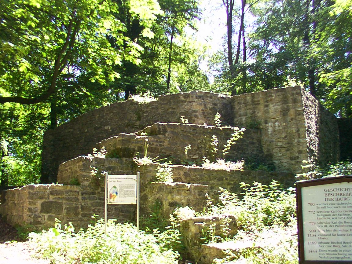 Bad Driburg: Ruine der Iburg